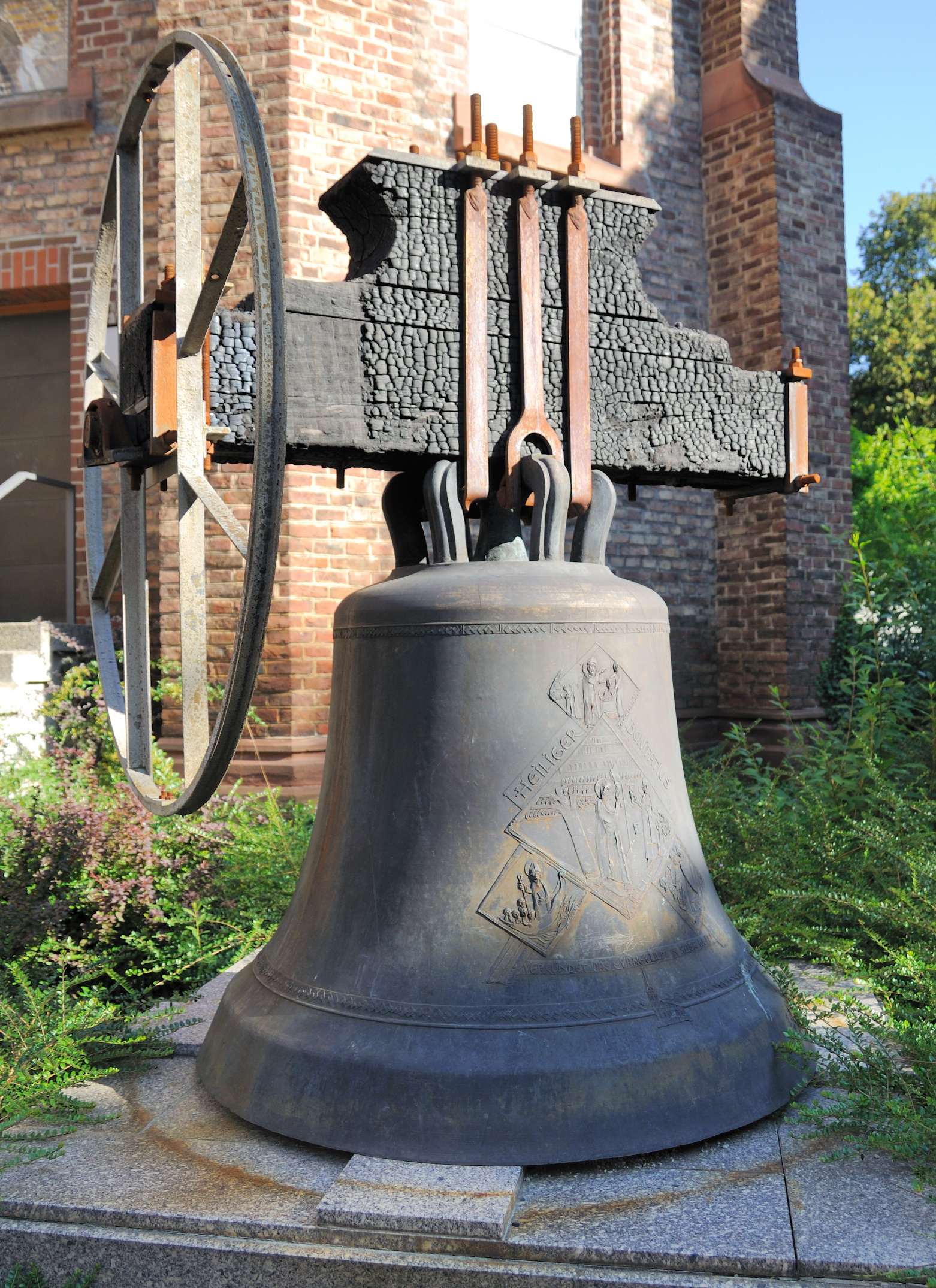 Lörrach: St. Bonifatius (Glocke zur Erinnerung des Brandes am 15. Juli 2007)